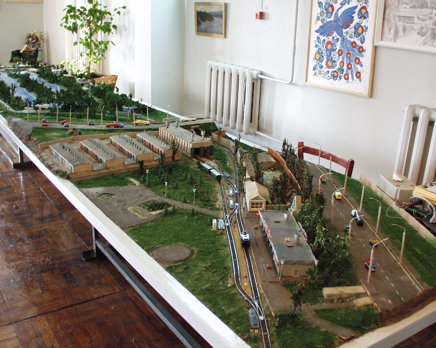 Макет Запорожской детской железной дороги, выполненный юными железнодорожниками.